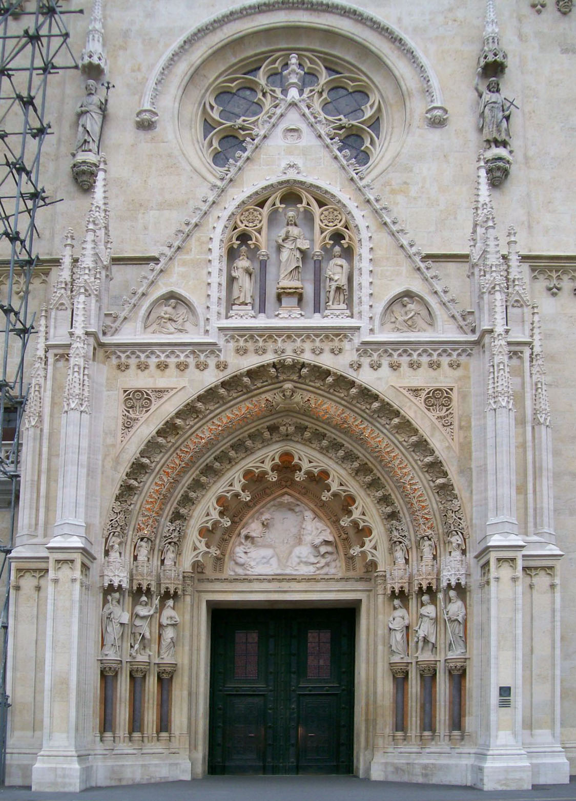 Portal Zagrebačke katedrale